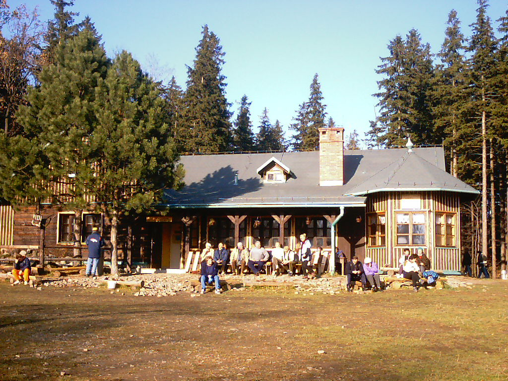 Schronisko Stefanka na Koziej Gorze w Bielsku-Bialej